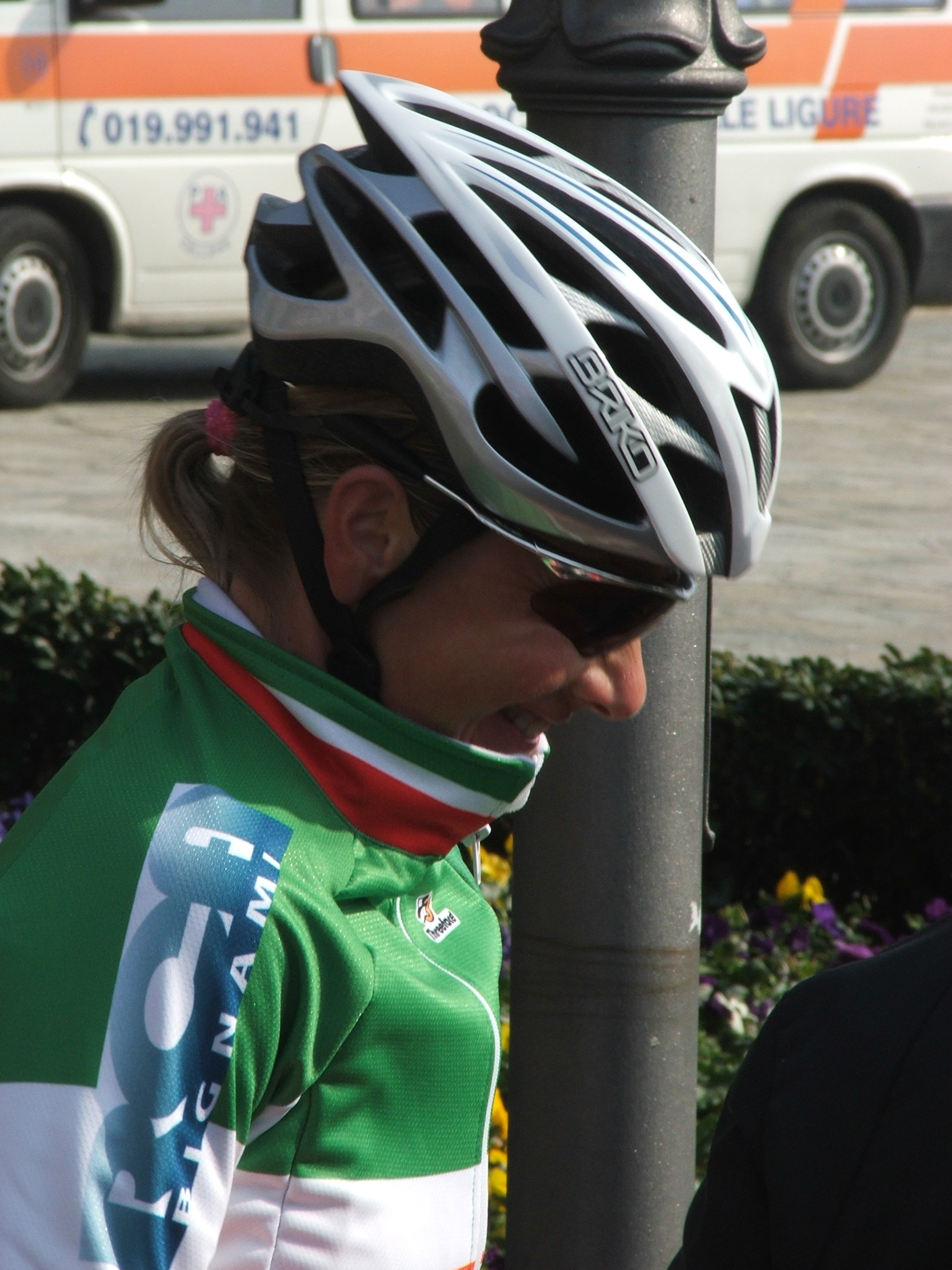 Terza granfondo Olmo di Celle Ligure Memorial "Pietro Oliva". Prima prova della Coppa Liguria 2008.